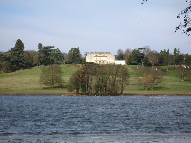 Gatton Hall